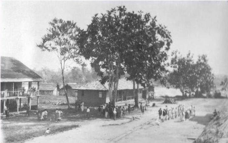 foto antigua de puerto asis